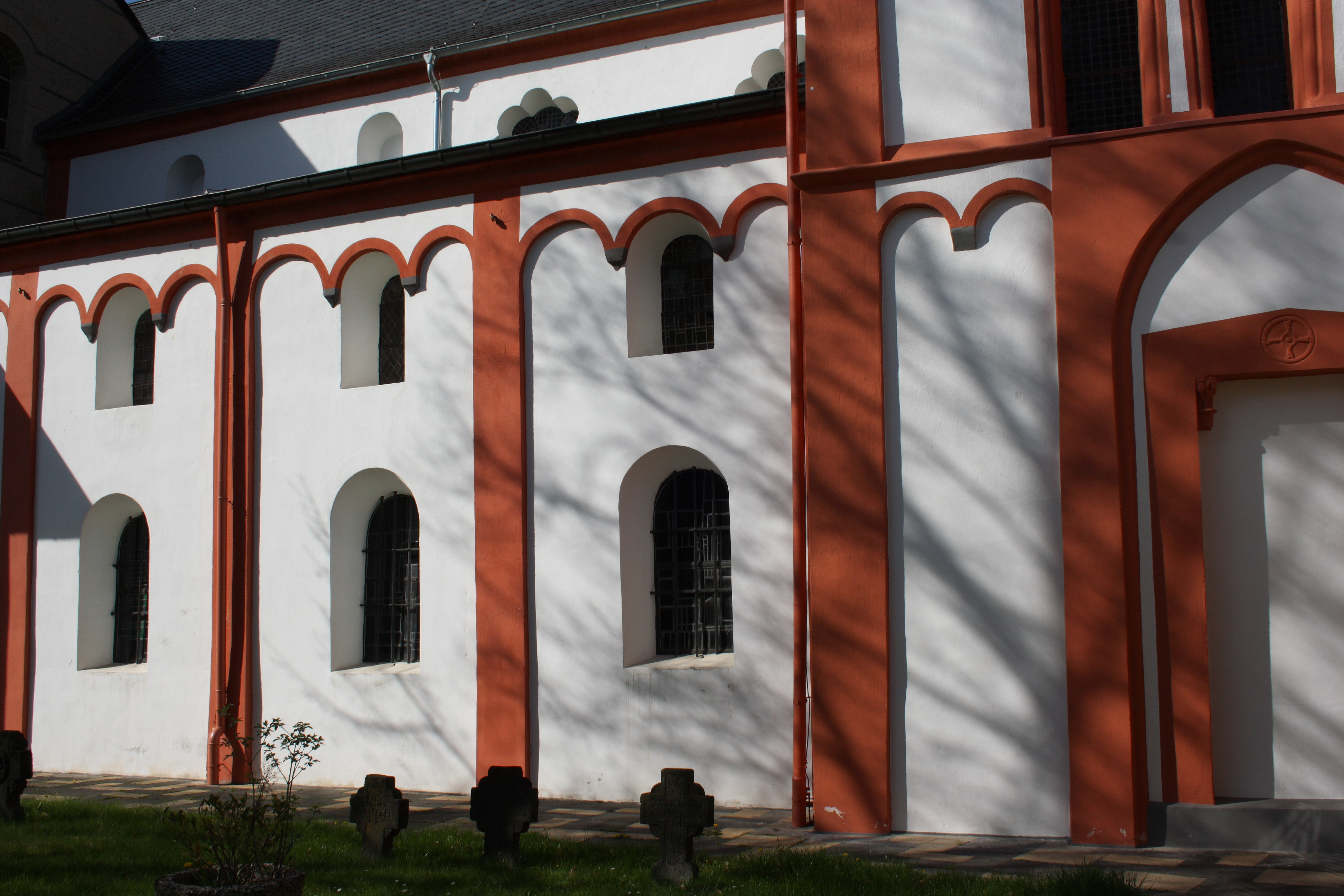 katholische Pfarrkirche St. Mauritius in Heimersheim, Bad Neuenahr-Ahrweiler